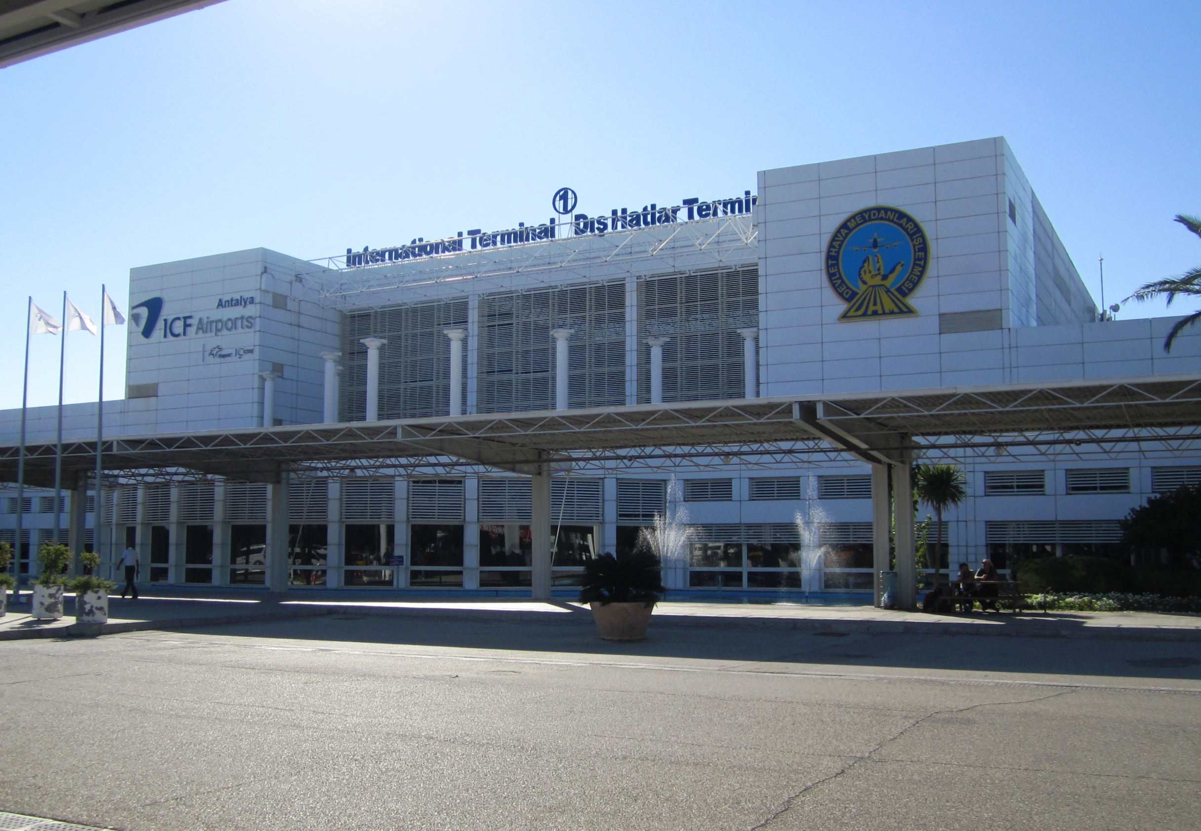 Antalya Flughafen Internationaler Terminal